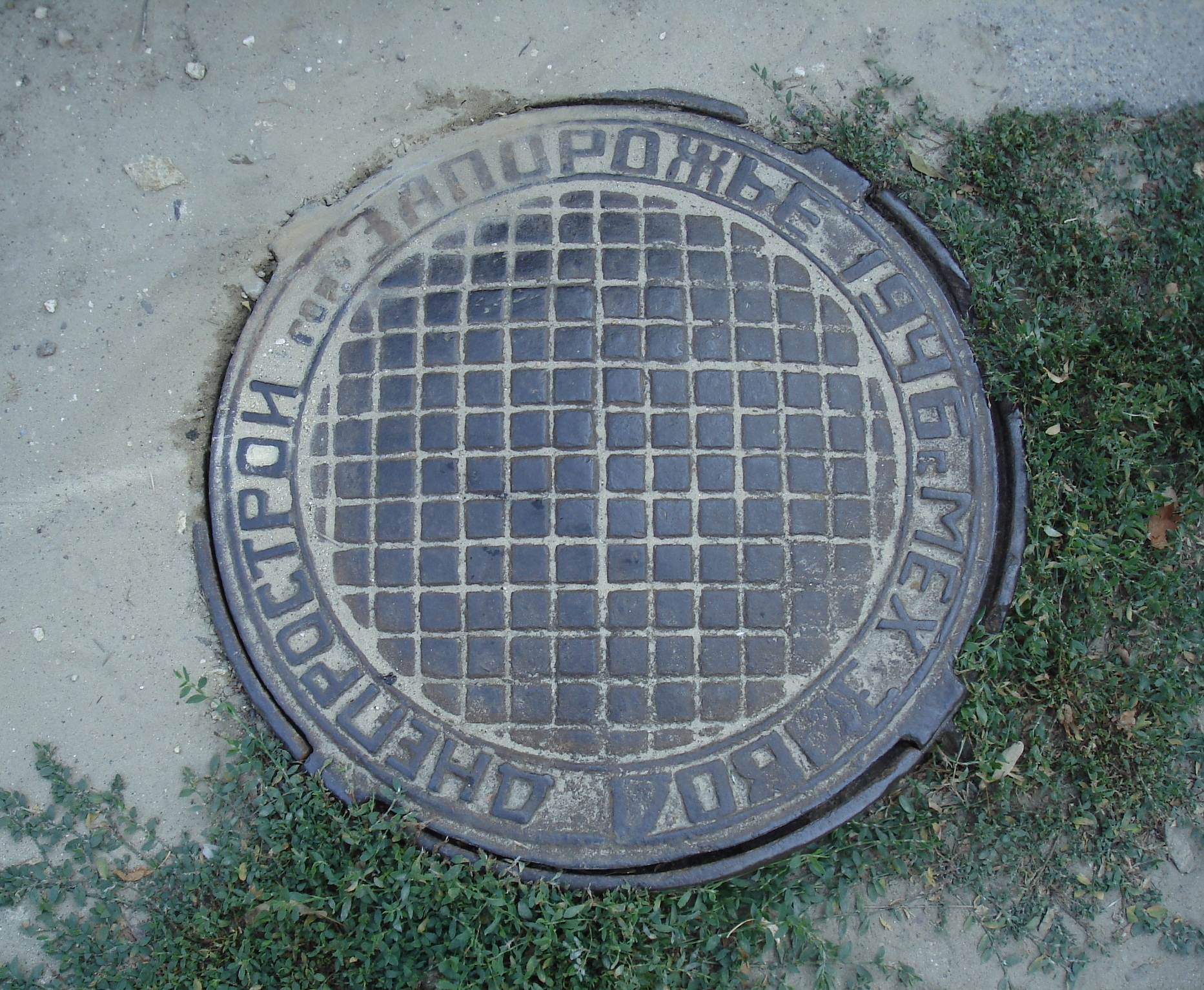 Канализационный колодец в Новой Каховке